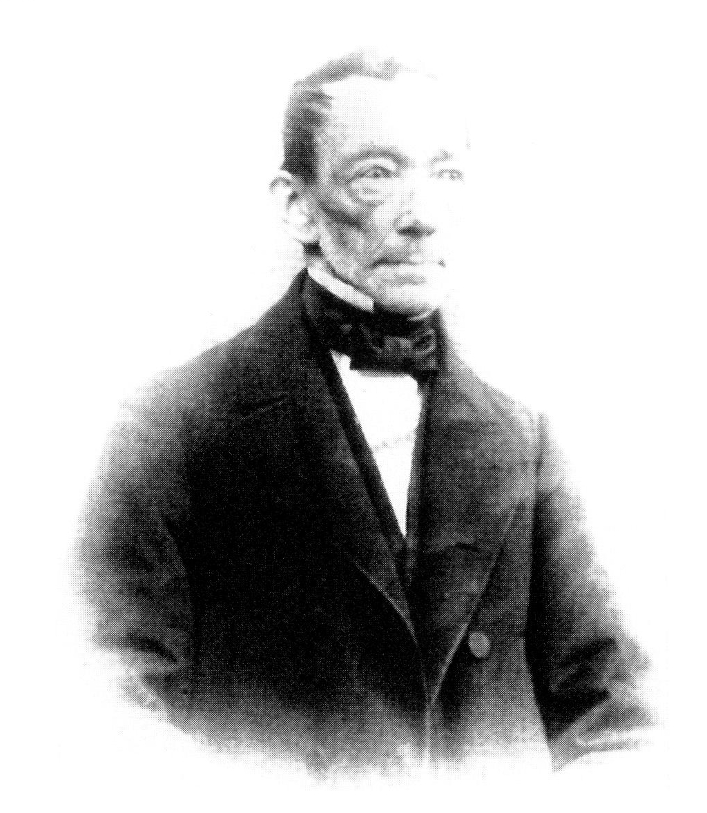 Eduard Alberti (1798-1883), Landtagspräsident Reuß j. L.